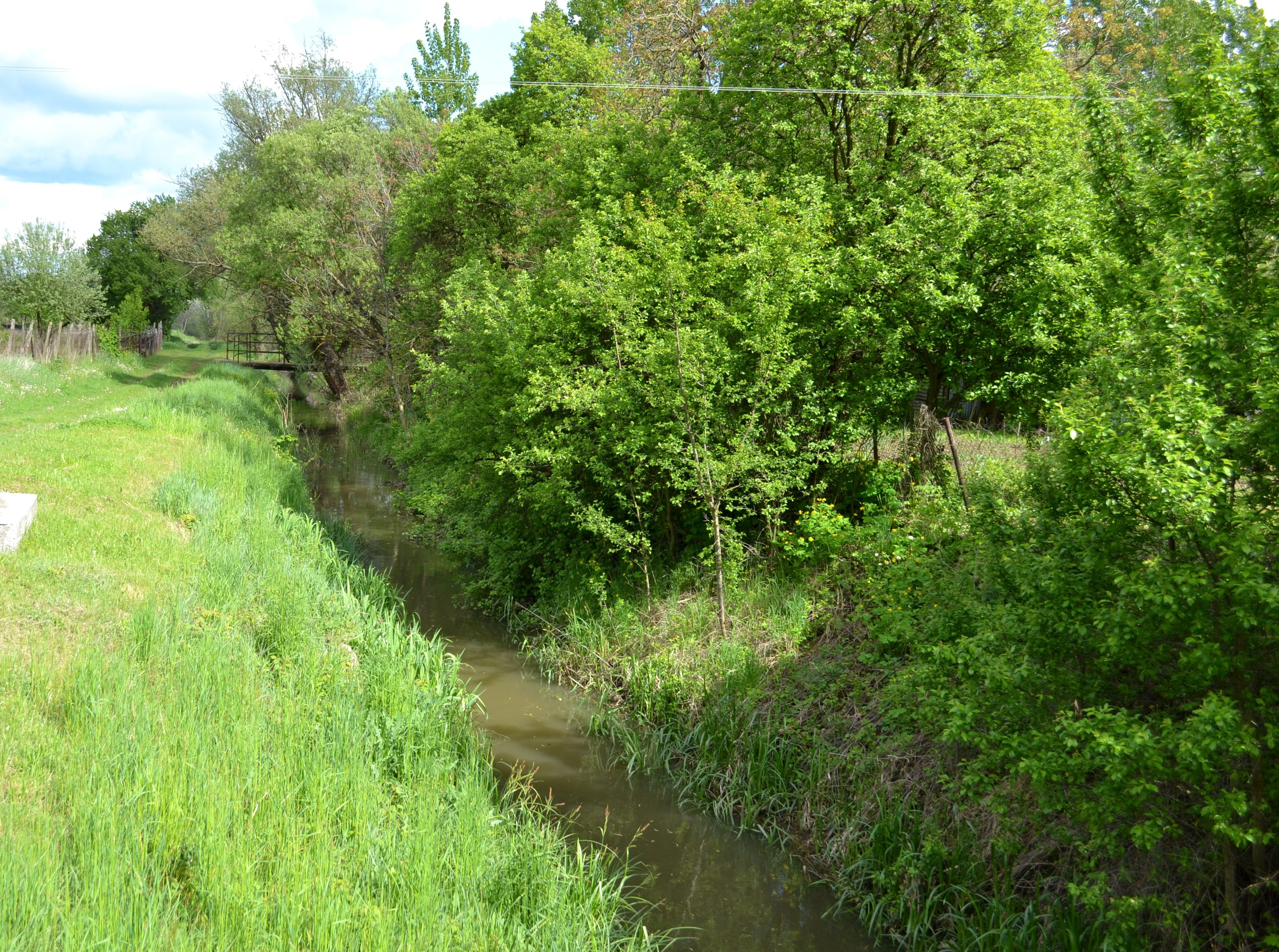 Gortva pretekajúca obcou Gemerský Jablonec